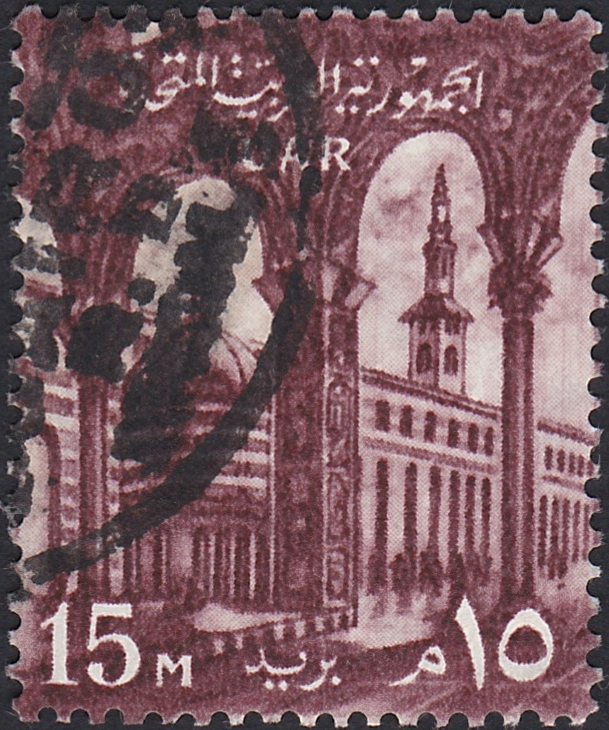 Timbre de la République arabe unie, 15M, émission de 1959.